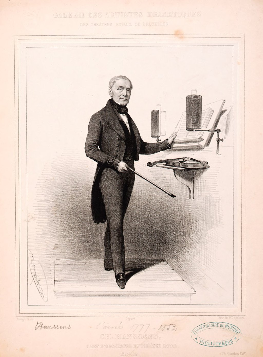 Charles-Louis-Joseph Hanssens (1777-1852), c. 1840